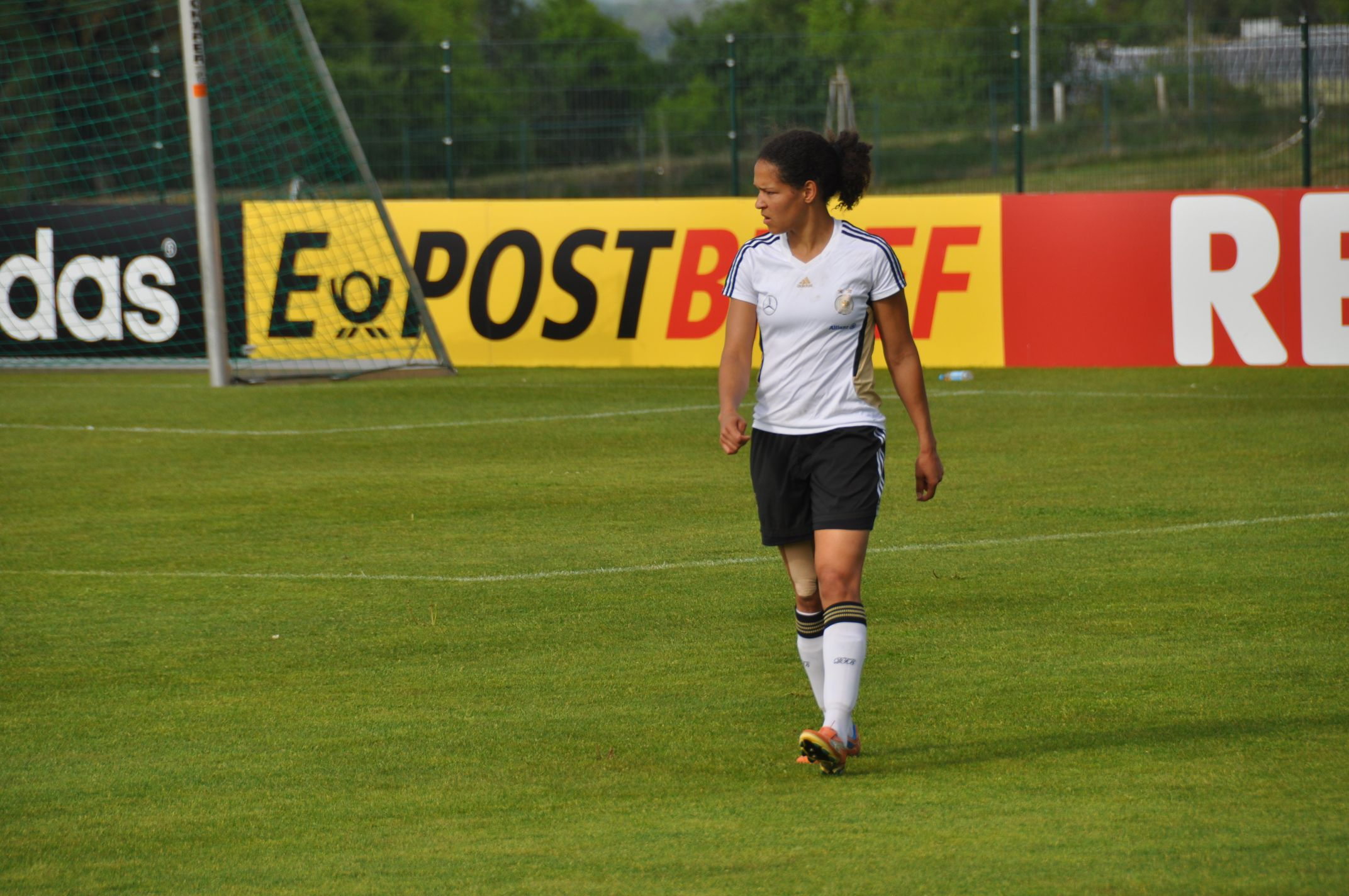 Foto: Nicola Egelhof